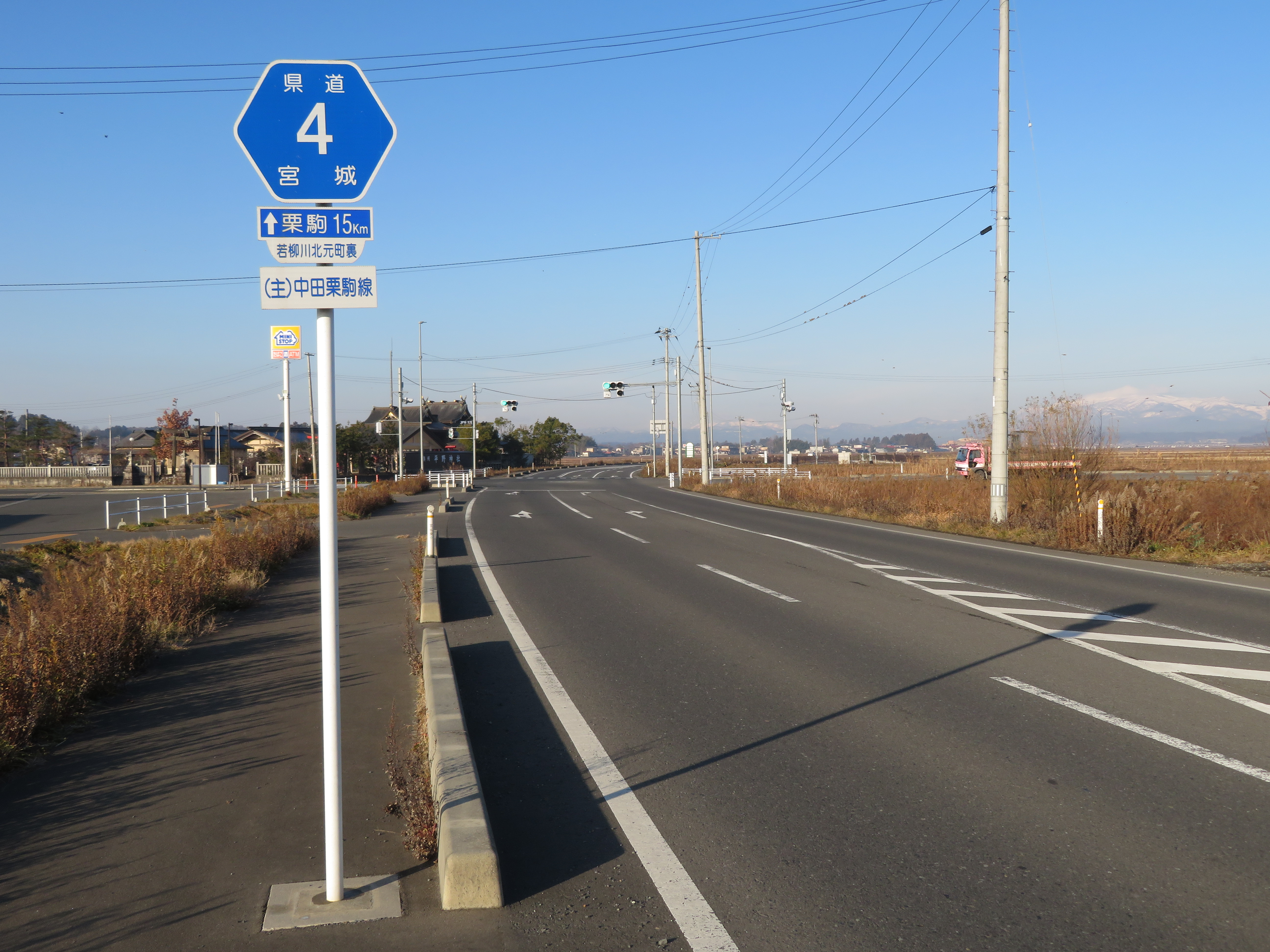 宮城県道４号線栗原市若柳川北元町裏付近（金成方面を撮影） Canon PowerShot SX720 HS